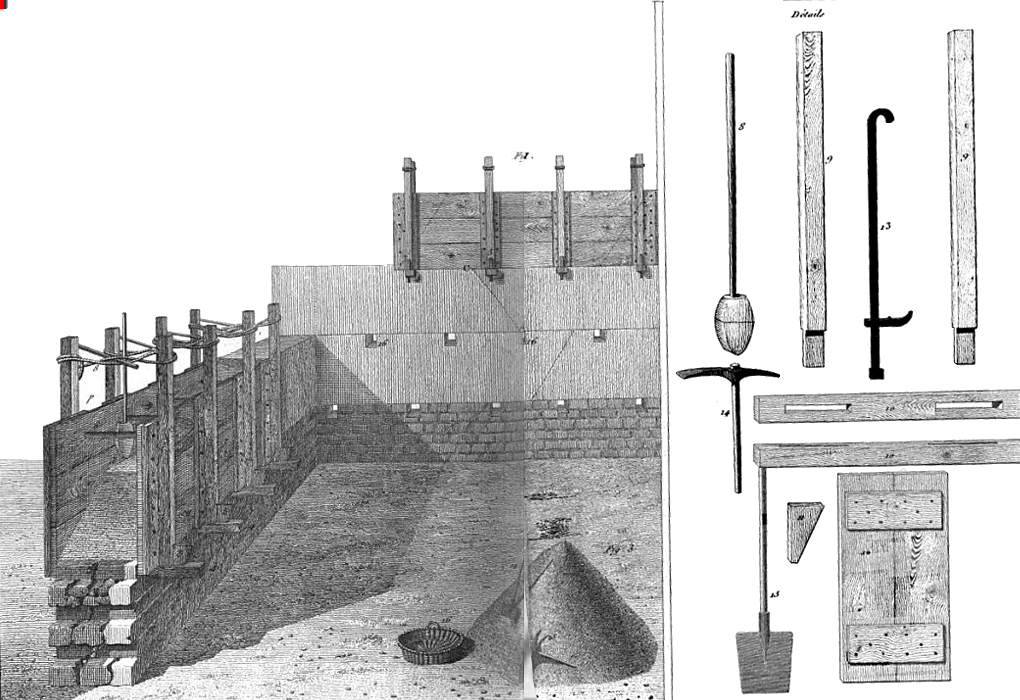 Les outils pour réaliser le Pisé